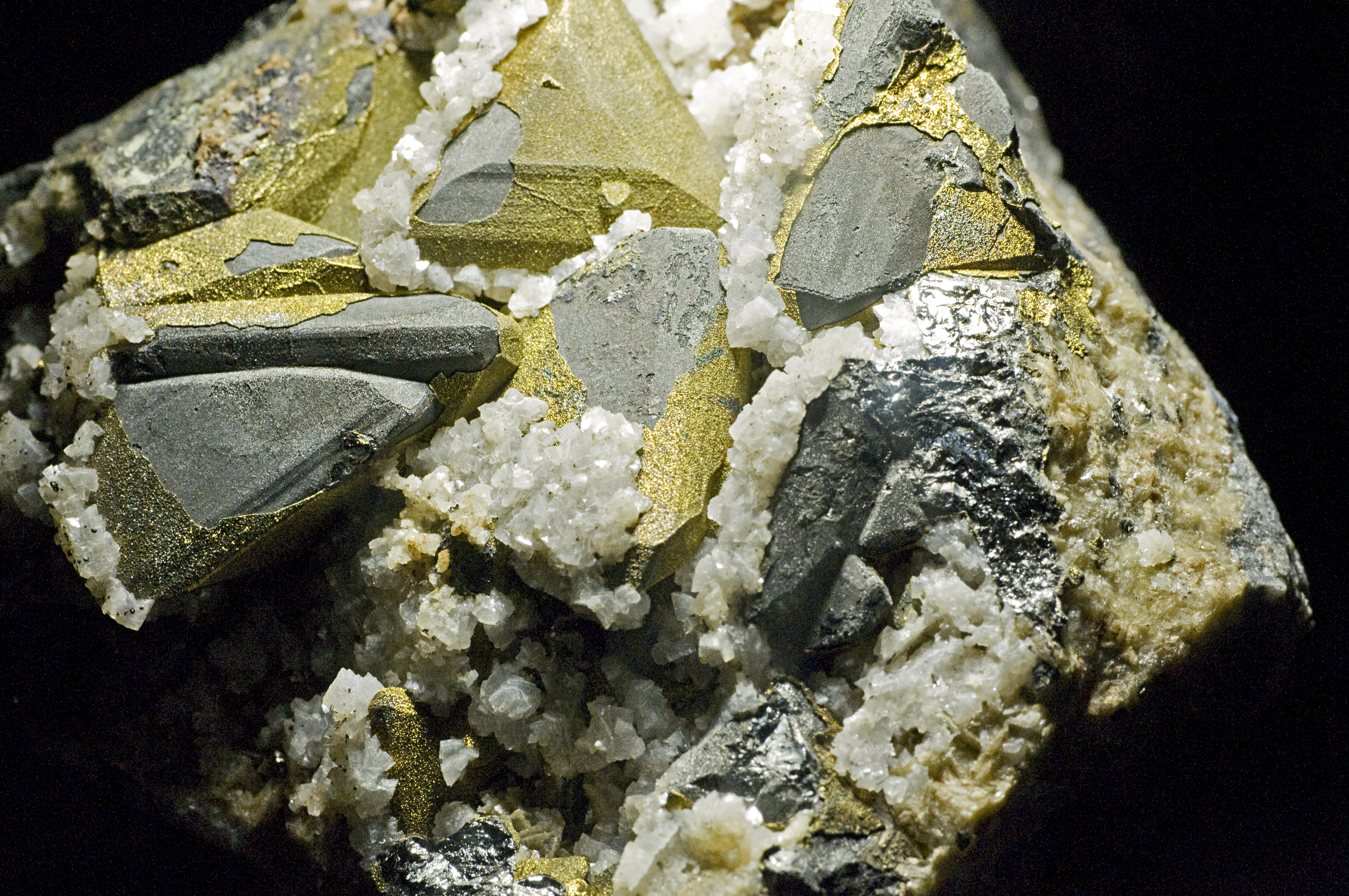 Mineraliensammlung des Naturmuseums Senckenberg Tetraedit mit Kupferkies (Chalkopyrit)